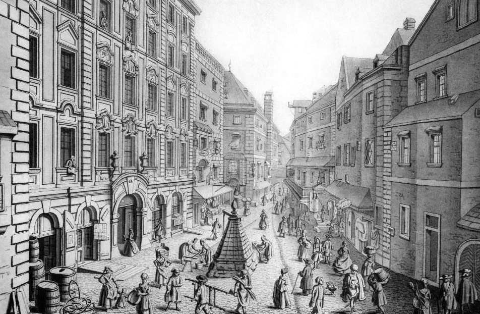 Brunnen am Wiener Fischhof (dem ehemaligen Fischmarkt) beim Hohen Markt, Stich von Salomon Kleiner, 1737